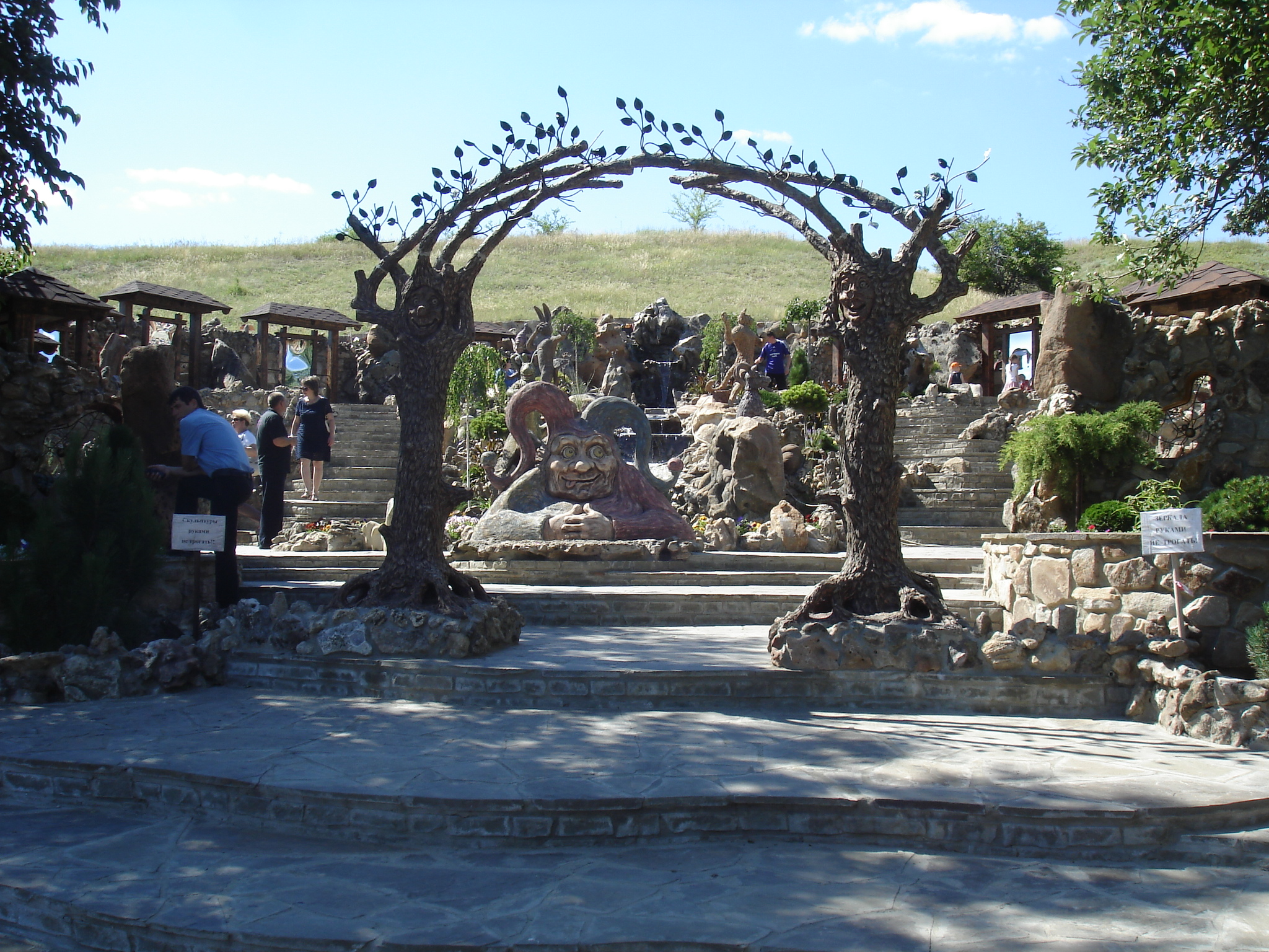 Старая Станица, площадка кривых зеркал (Парк Лога)